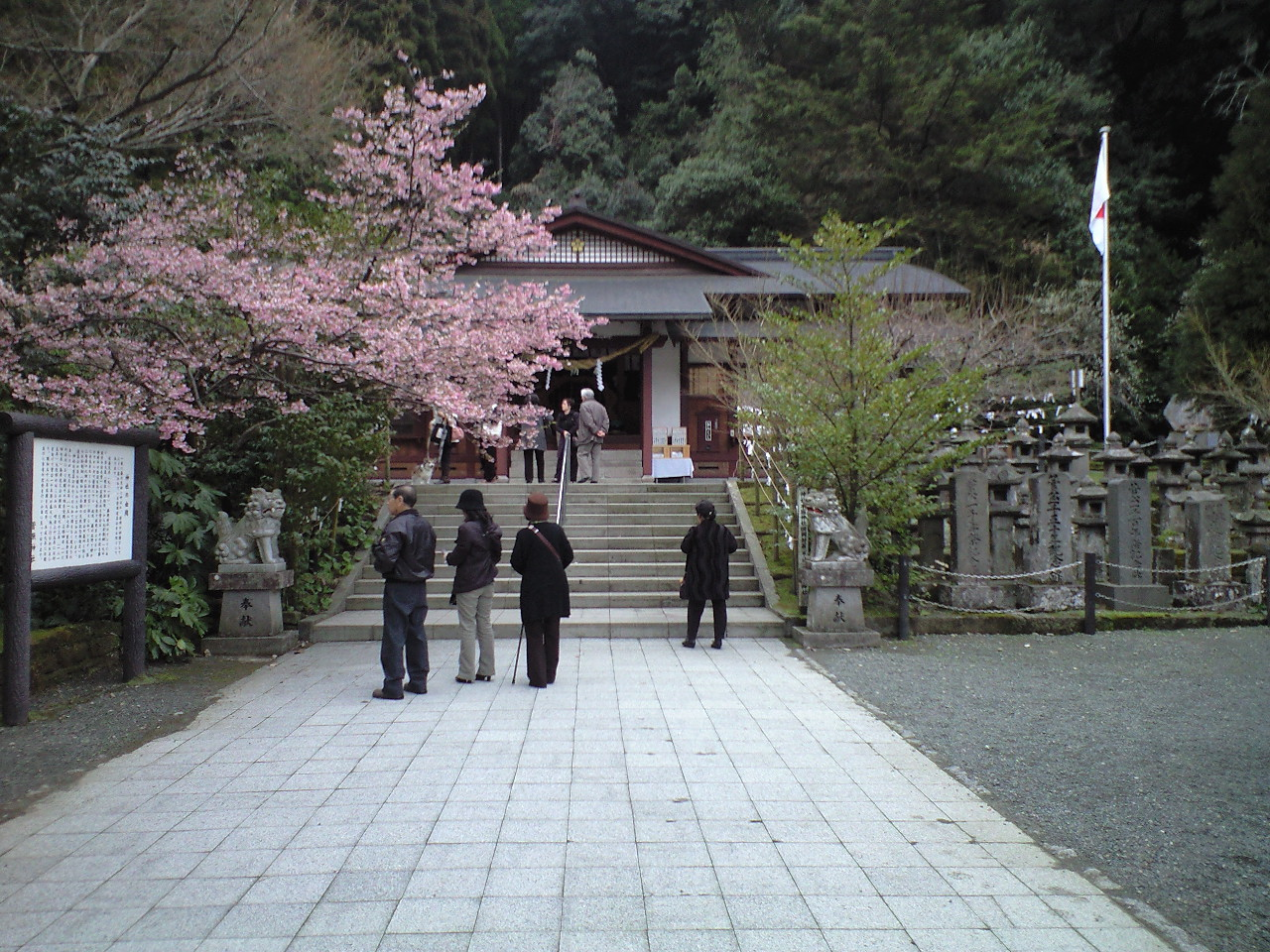 藤川天神の写真